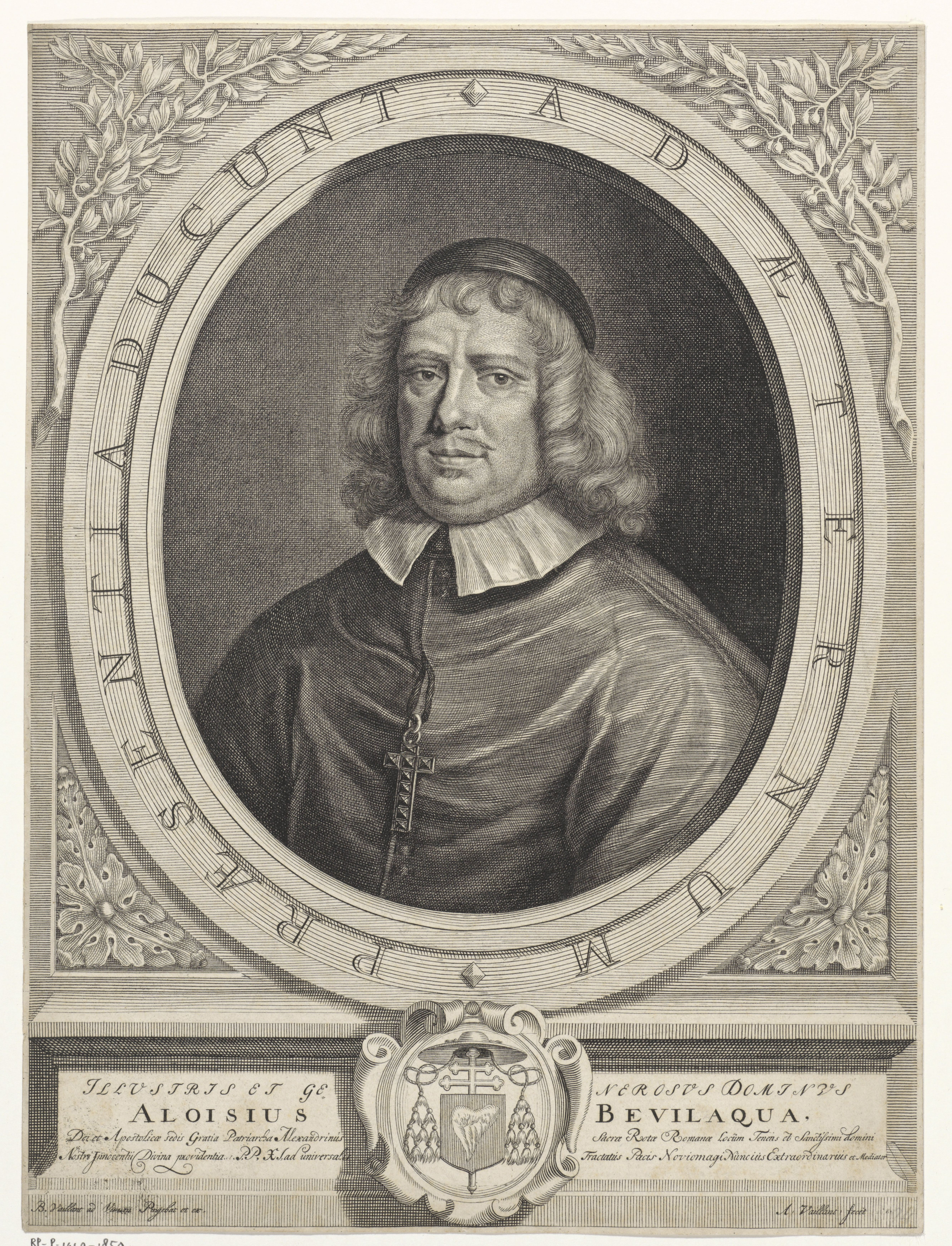 IdentificatieTitel(s): Portret van Aloysius BevilacquaObjecttype: prent Objectnummer: RP-P-1910-1850Catalogusreferentie: Hollstein Dutch 34Opschriften / Merken: verzamelaarsmerk, verso, gestempeld: Lugt 2228Omschrijving: Portret van Aloysius Bevilacqua, patriarch van Alexandrië.VervaardigingVervaardiger: prentmaker: Andries Vaillant (vermeld op object)naar schilderij van: Bernard Vaillant (vermeld op object)uitgever: Bernard Vaillant (vermeld op object)Datering: 1675 - 1680Fysieke kenmerken: gravure en etsMateriaal: papier Techniek: graveren (drukprocedé) / etsenAfmetingen: blad: h 342 mm × b 255 mmOnderwerpWie: Aloysius BevilacquaVerwerving en rechtenVerwerving: aankoop 1910Copyright: Publiek domein